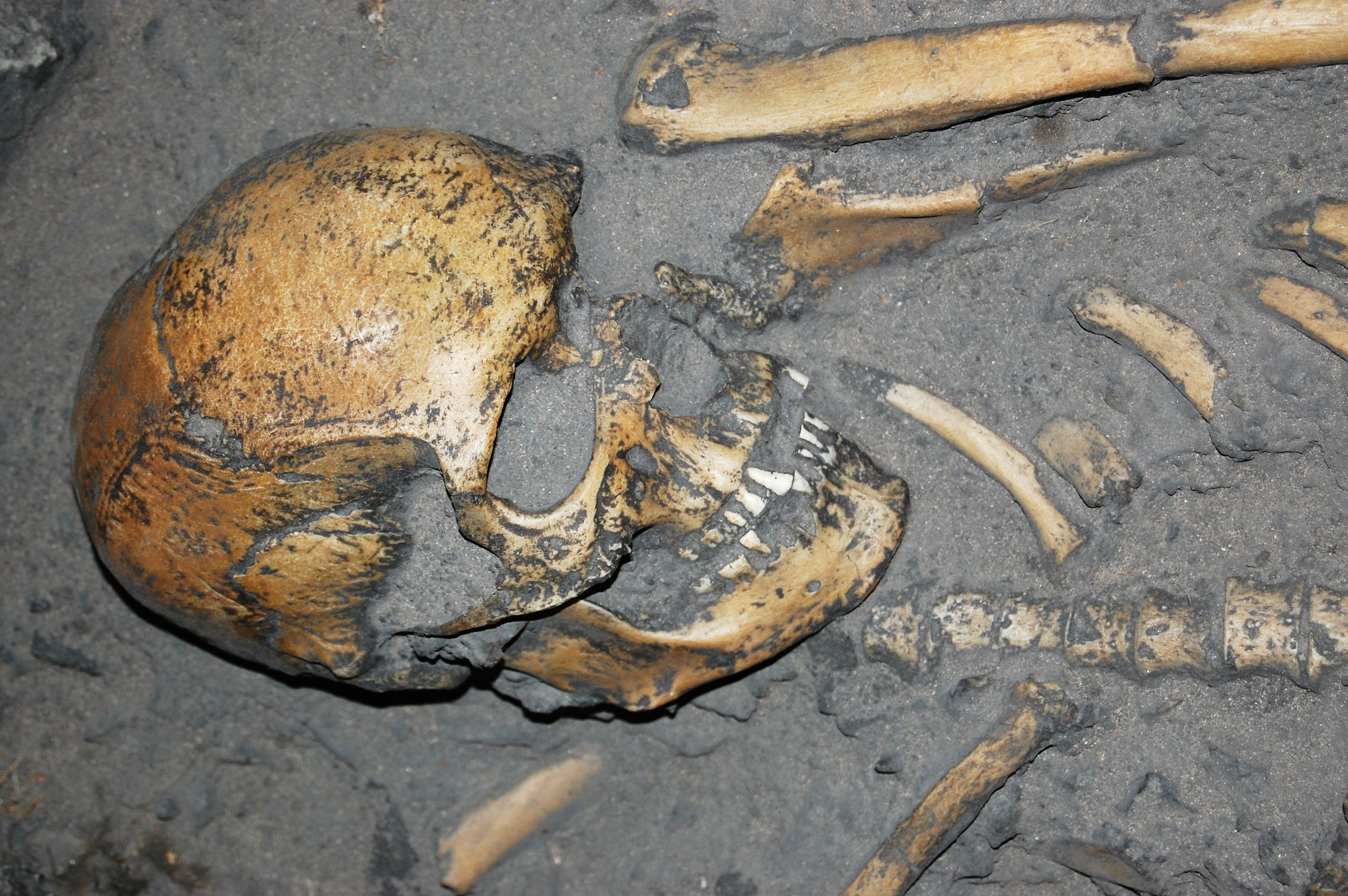 Particolare del cranio